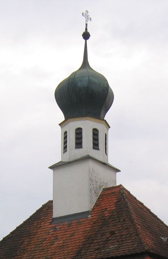 Der Glockenturm der Kapelle Bruck bei Neuburg